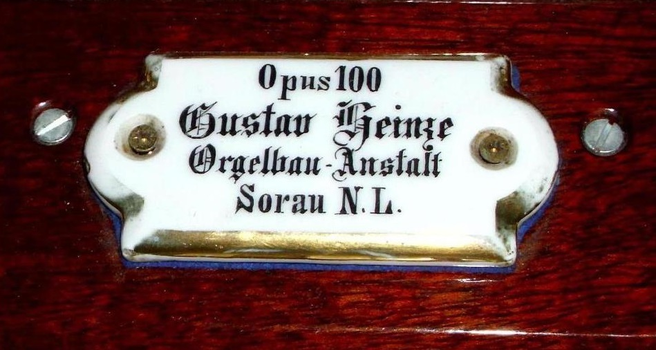 sulechów